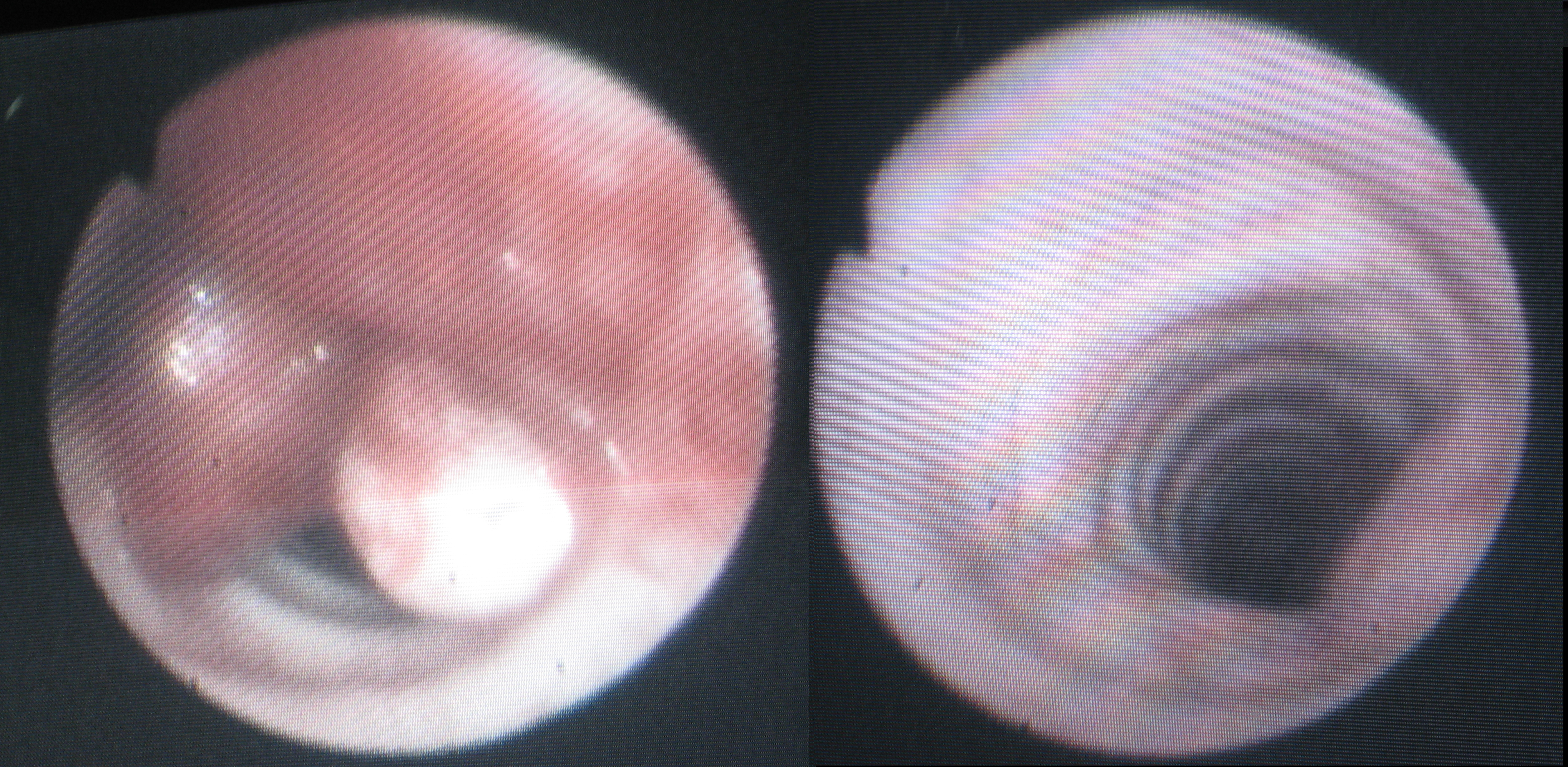 Metastasis traqueal de cancer de mama.